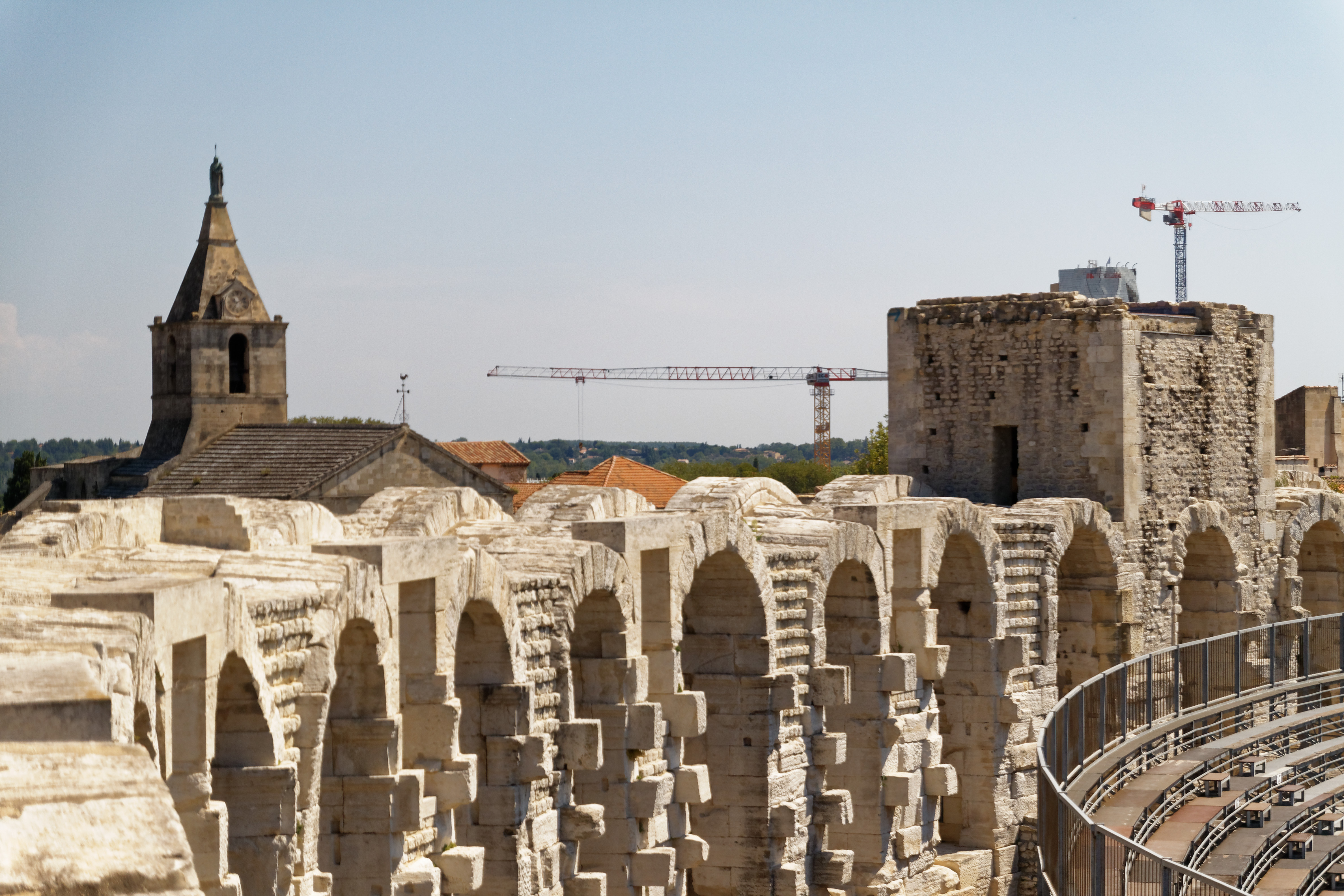 Aussicht vom Nordturm des Amphitheaters von Arles aus nach Südwesten mit der Kirche Notre-Dame-la-Major